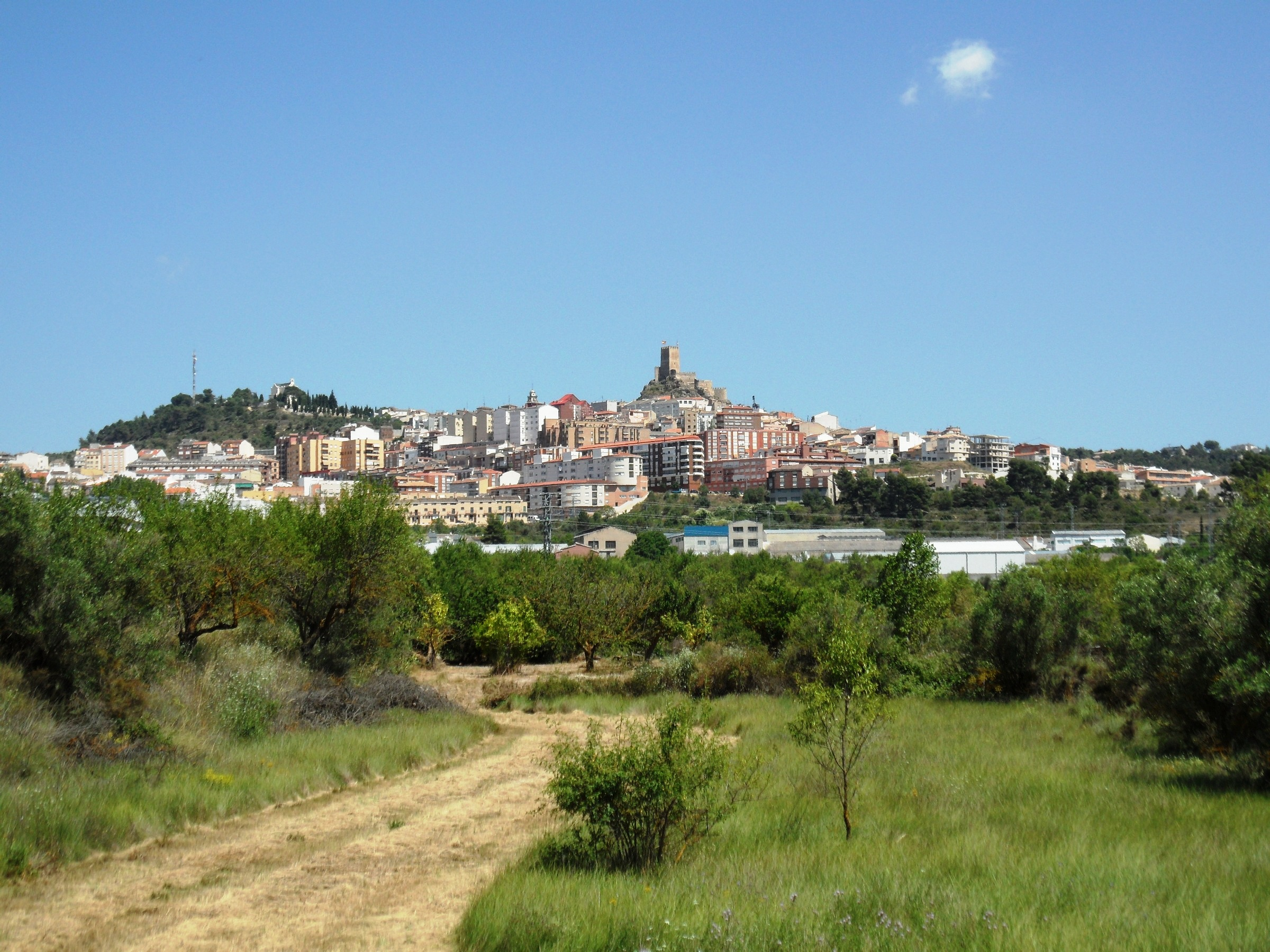 Banyeres de Mariola des de la via verda del Xitxarra.